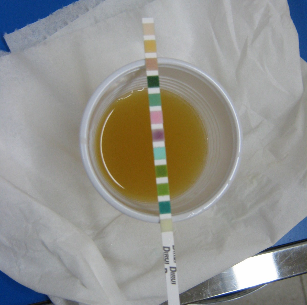 Prélèvement d'urine pour bandelette utinaire (BU) : urine trouble, sang +++, nitrite +++, leucocyte +++ signant une infection urinaire